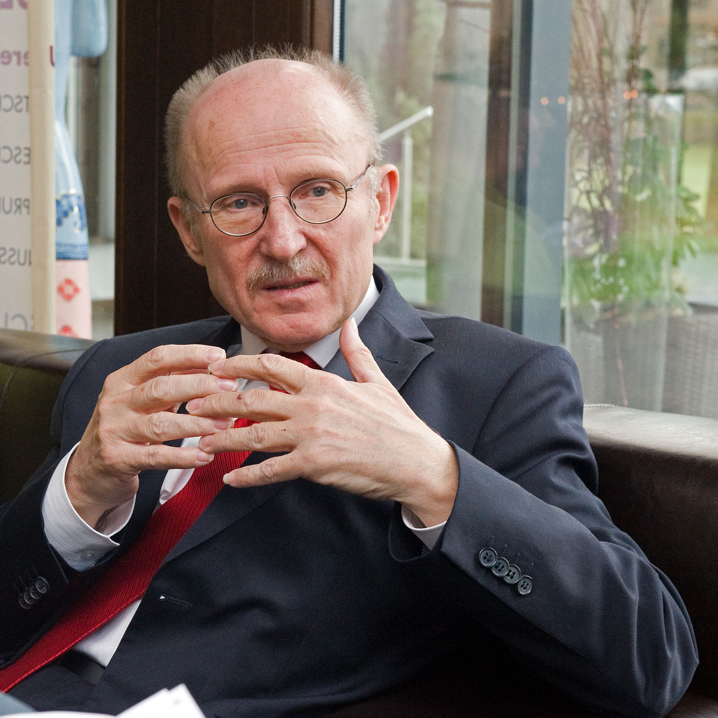 Willi Lemke, UN-Sonderberater für Sport, bei einem Interview